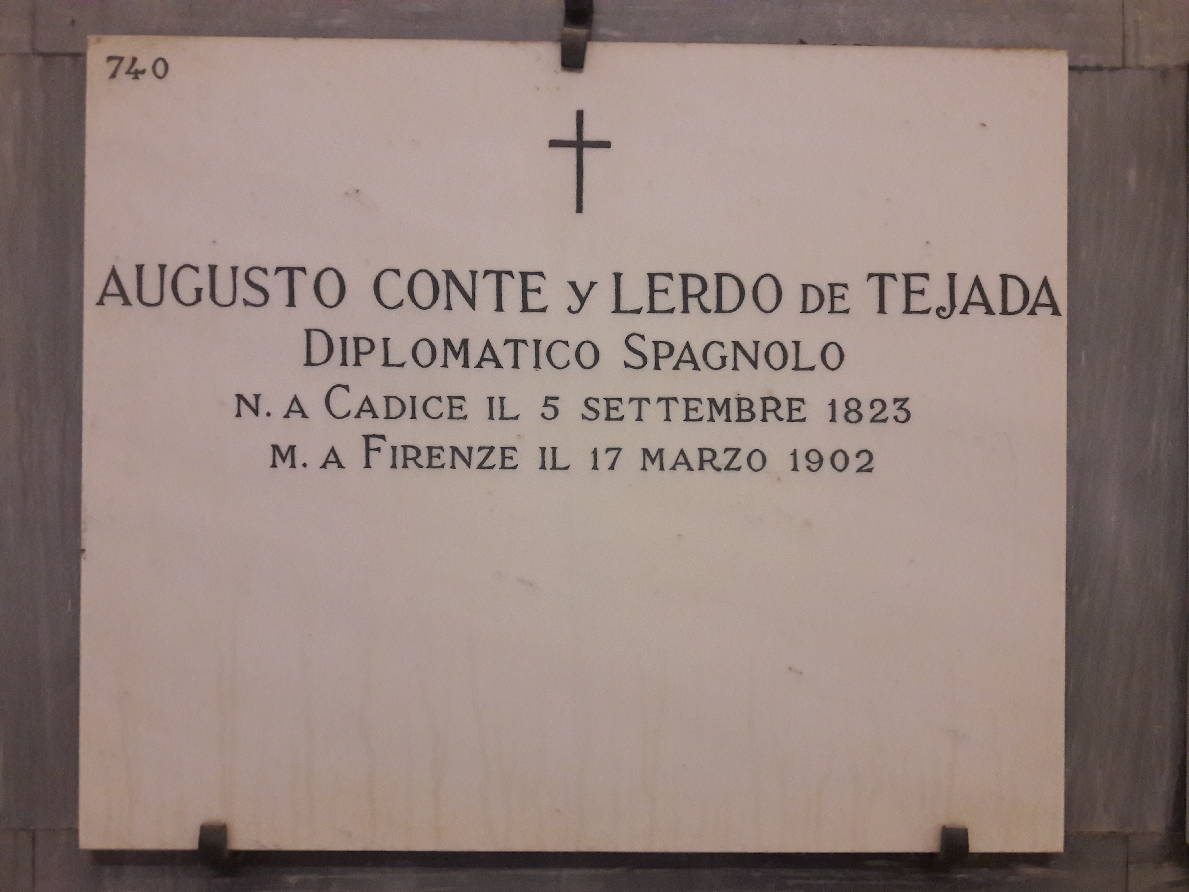 Placa fúnebre de Augusto Conte y Lerdo de Tejada, en el Cimitero delle Porte Sante, Florencia, Italia